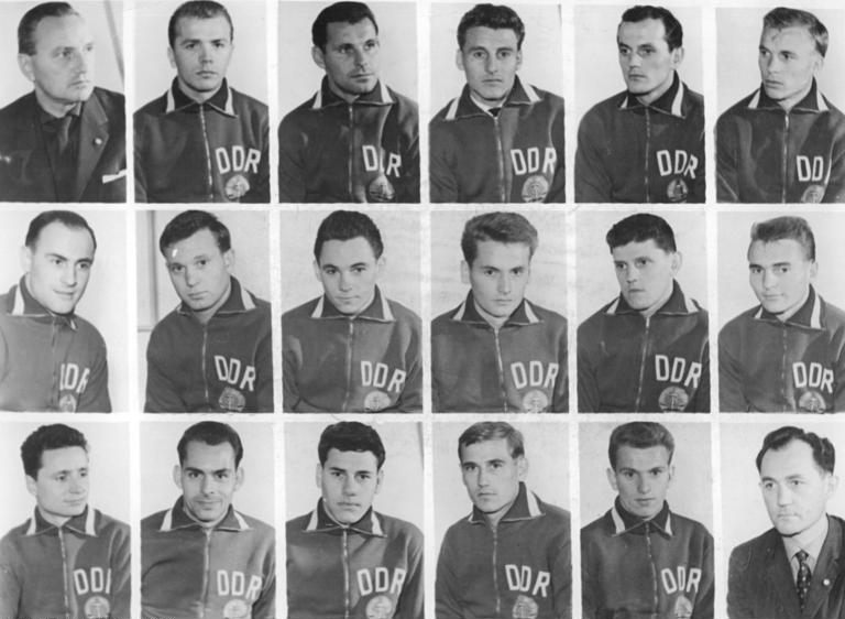 Zentralbild/Studre Stu-Pr 12.2.1964 Tableau. Fußball-Nationalmannschaft der DDR. Oben v.l.n.r.: Trainer Karoly Soos, Nationalspieler Klaus Urbanczyk, Werner Unger, Hermann Stöcker, Otto Fräßdorf, Wolfgang Barthels. Mitte v.l.n.r.: Harald Fritzsche, Hans-Jürgen Heinsch, Hennig Frenzel, Gerhard Körner, Werner Linß, Klaus-Dieter Seehaus. Unten v.l.n.r.: Dieter Erler, Heino Kleiminger, Eberhard Vogel, Herbert Pankau, Manfred Weikert, Trainer Hans Studner. In den frühen Morgenstunden des 12.2.1964 trat die Fußball-Olympiaauswahl unserer Republik ihre Reise nach Afrika an. Vom 14.2. bis 19.2.1964 wird sie in der VAR drei Spiele austragen, danach am 23.2.1964 in Kumasi gegen die ghanesische B-Auswahl und am 26.2.1964in Acora zum ersten offiziellen Länderspiel gegen Ghana antreten.